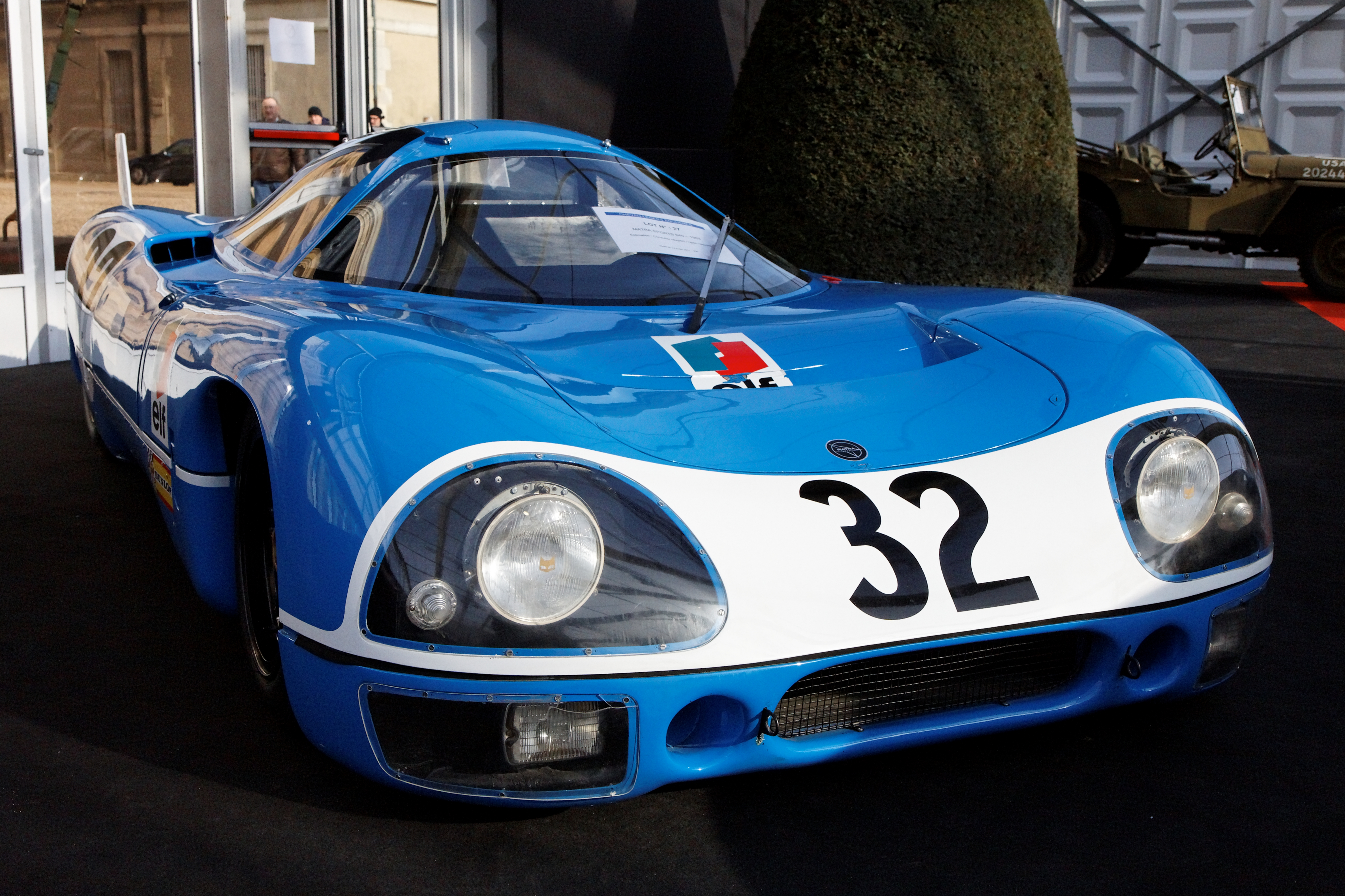 Matra MS640 - Festival Automobile International 2011 - Vente aux enchères